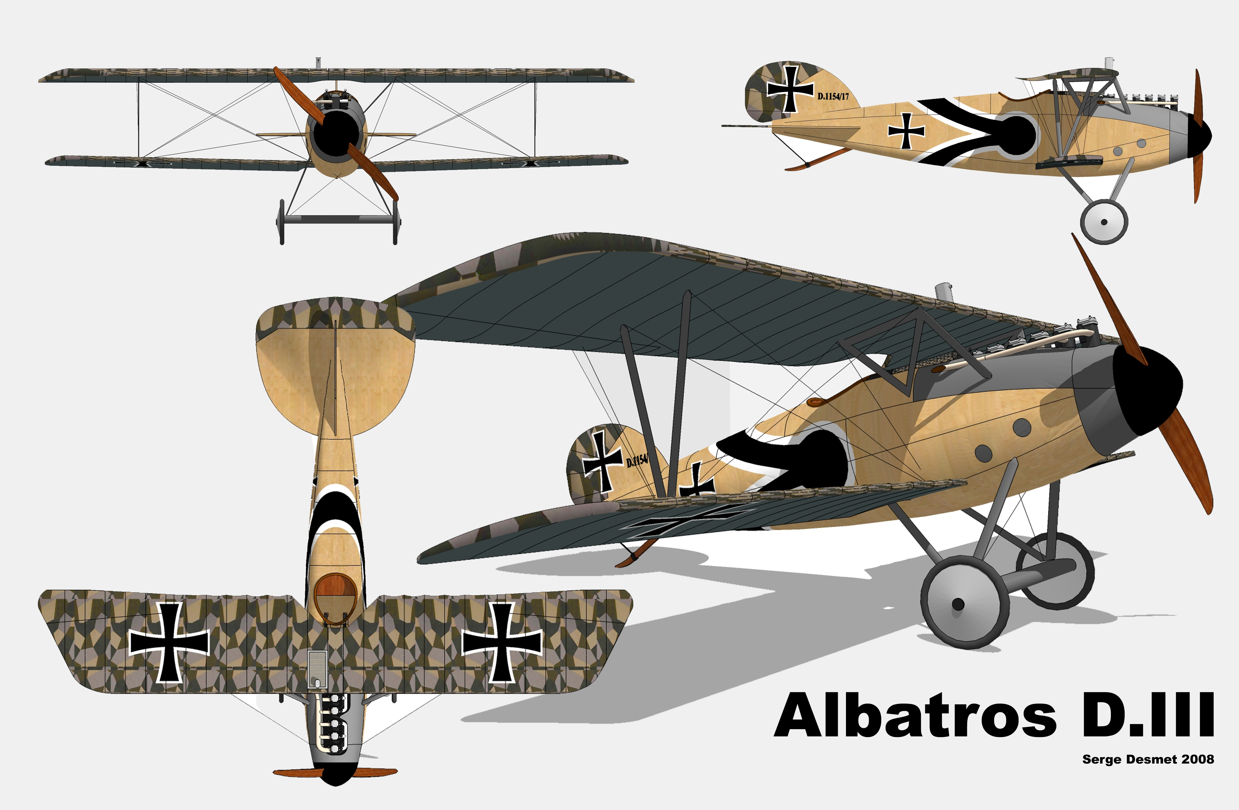 Plan 3 vues de l'Albatros D.III